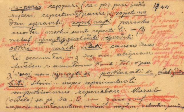 Rokopisi za slovar so bili napisani na skoraj 20.000 lističev